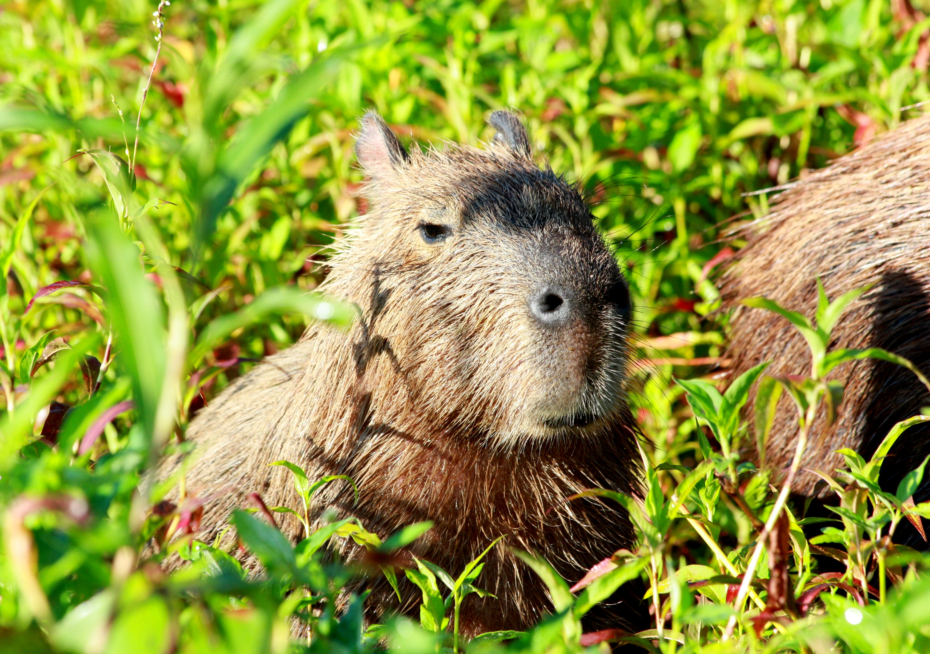 juvénile symbiotique